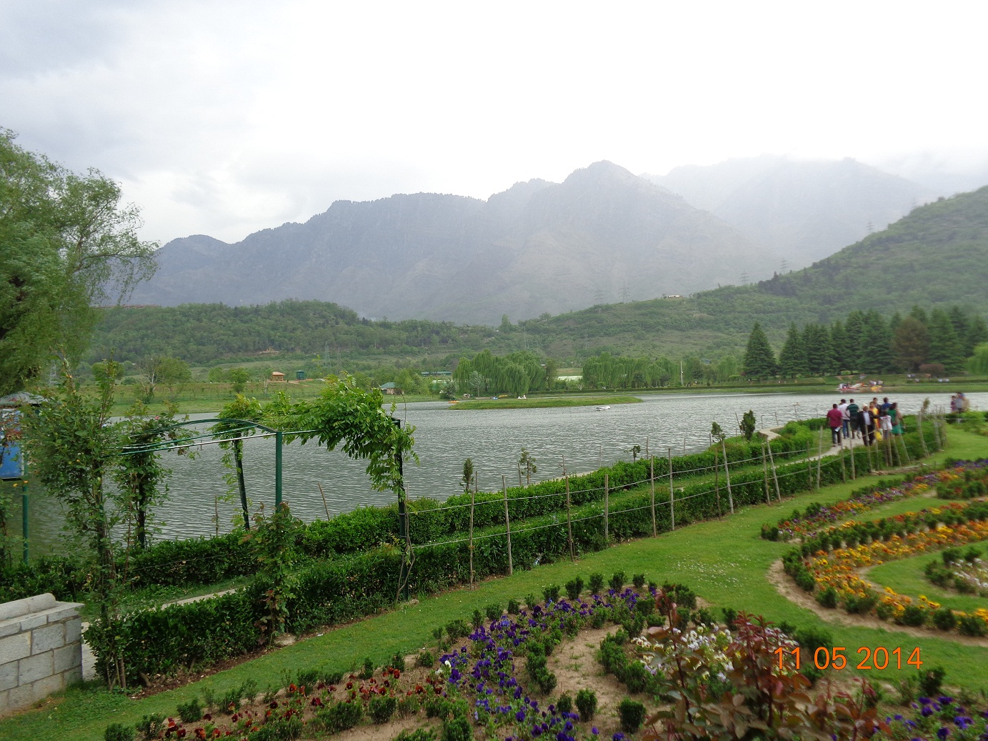 ശ്രീനഗർ ബൊട്ടാണിക്കൽ ഗാർഡനിലെ തടാകം